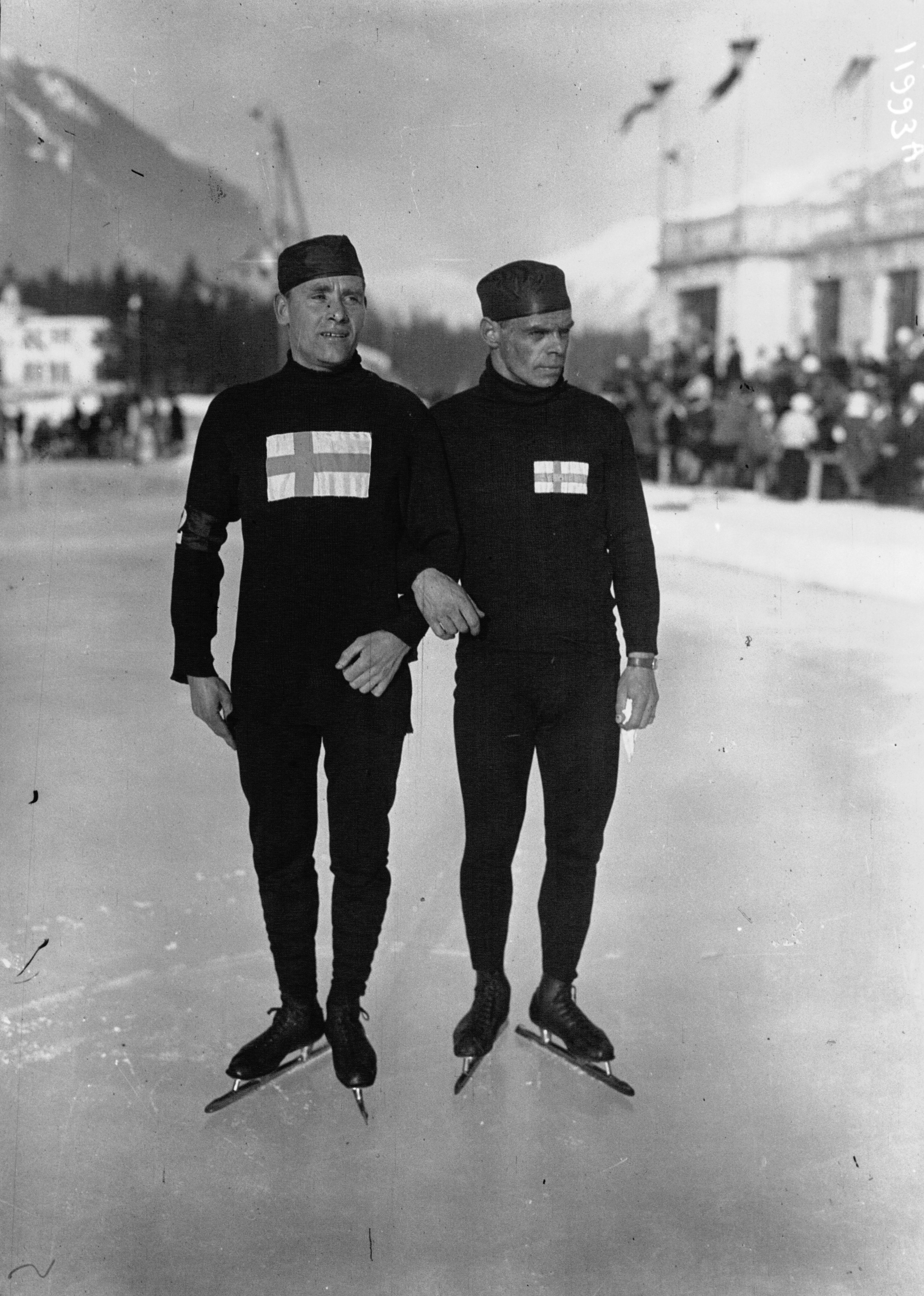 Olympiades à Chamonix le 28 Janvier 1924 : de gauche à droite Skuttnabb et Thurnberg